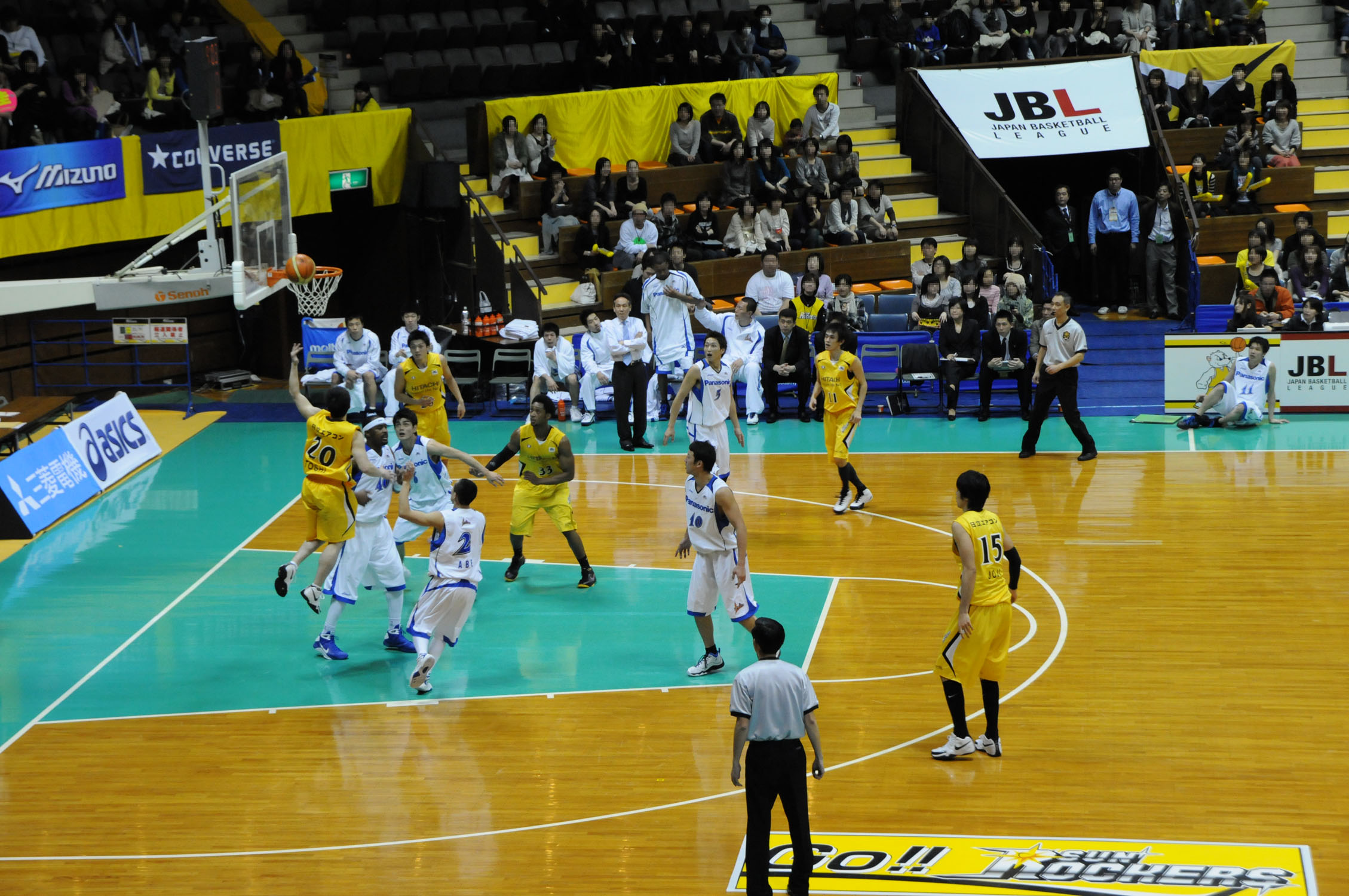 JBL 2008-2009シーズン、日立対パナソニック。代々木第二体育館で。